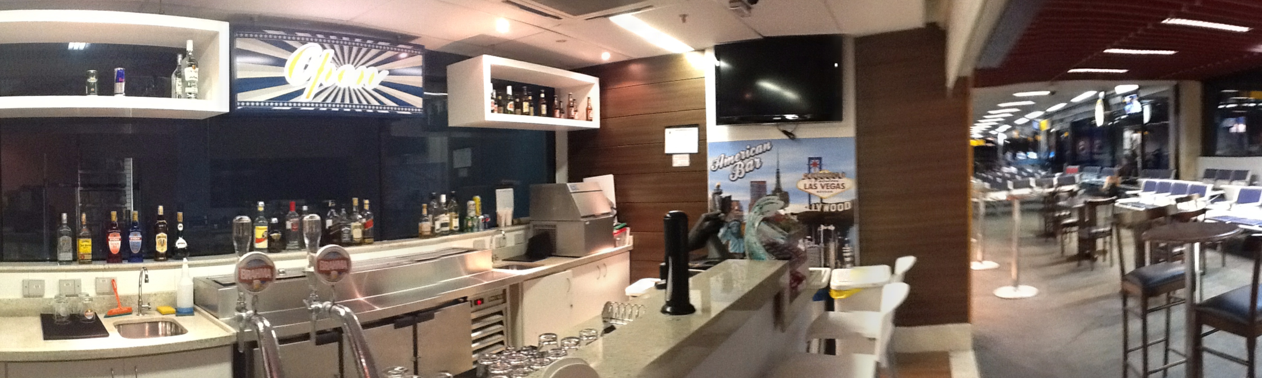 Aeroporto Internacional de Curitiba - Curitiba PR